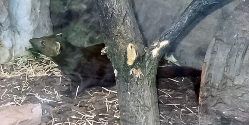 Ringstaartmungo (Galidia elegans) in Saarbrücker Zoo.